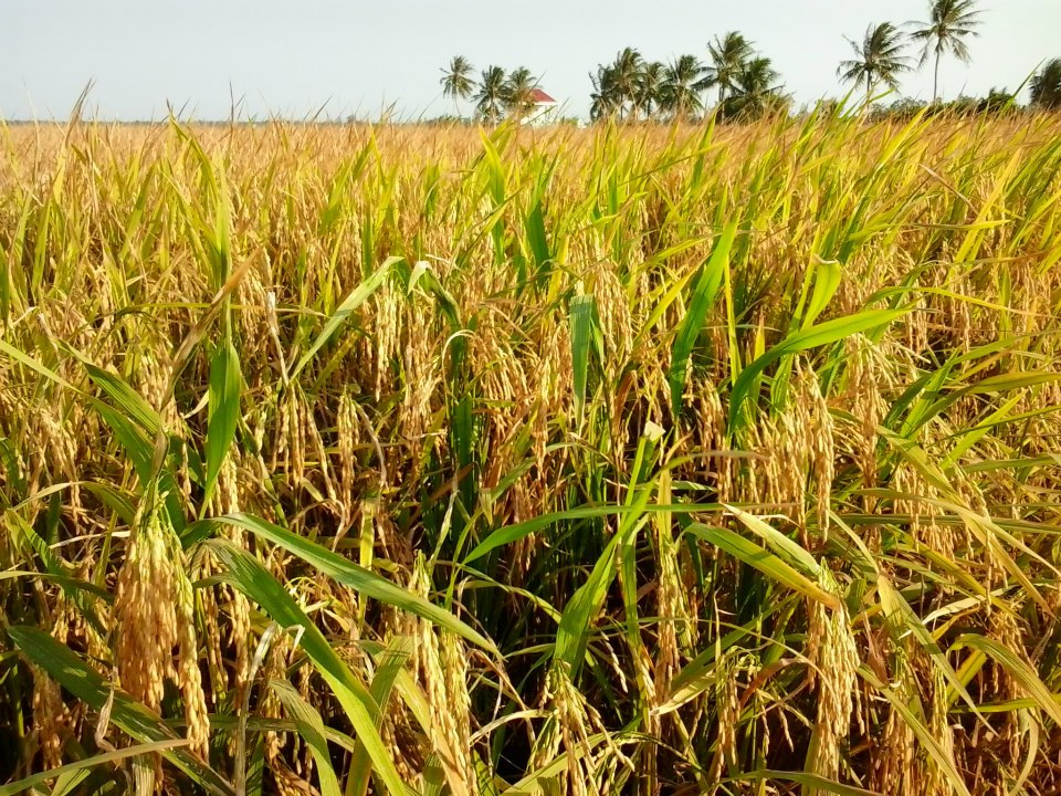 ruộng lúa 2